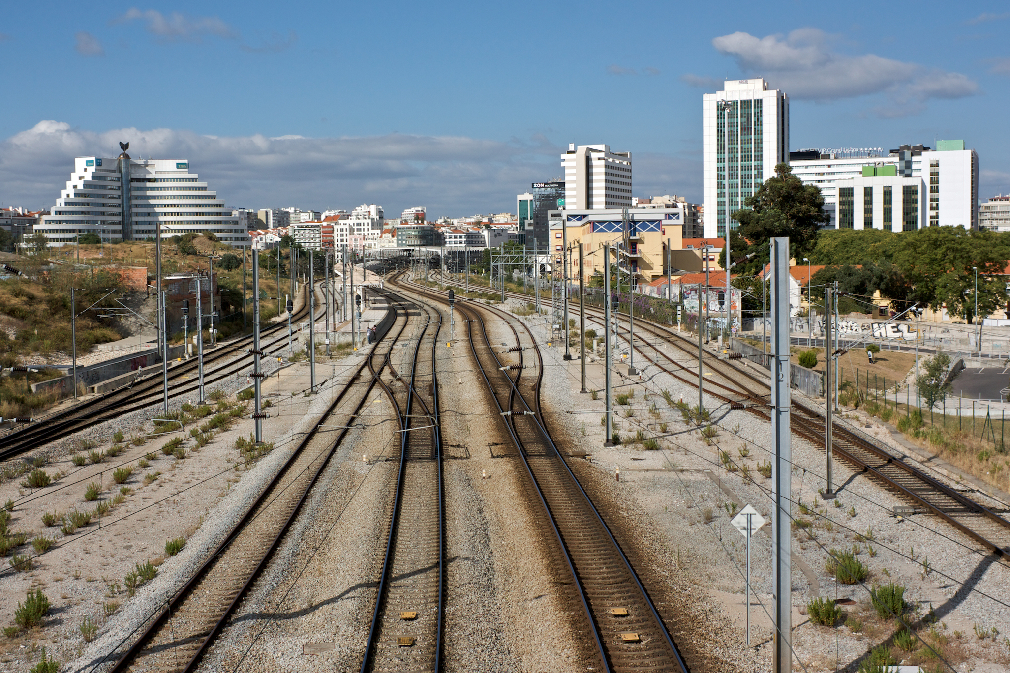 ao fundo, as estações de Entrecampos. Via férrea: Linha de Cintura [PK 5] Local: Rego (Lisboa) Data e hora: 24 de Junho de 2009 [18h11] Sentido: Braço de Prata